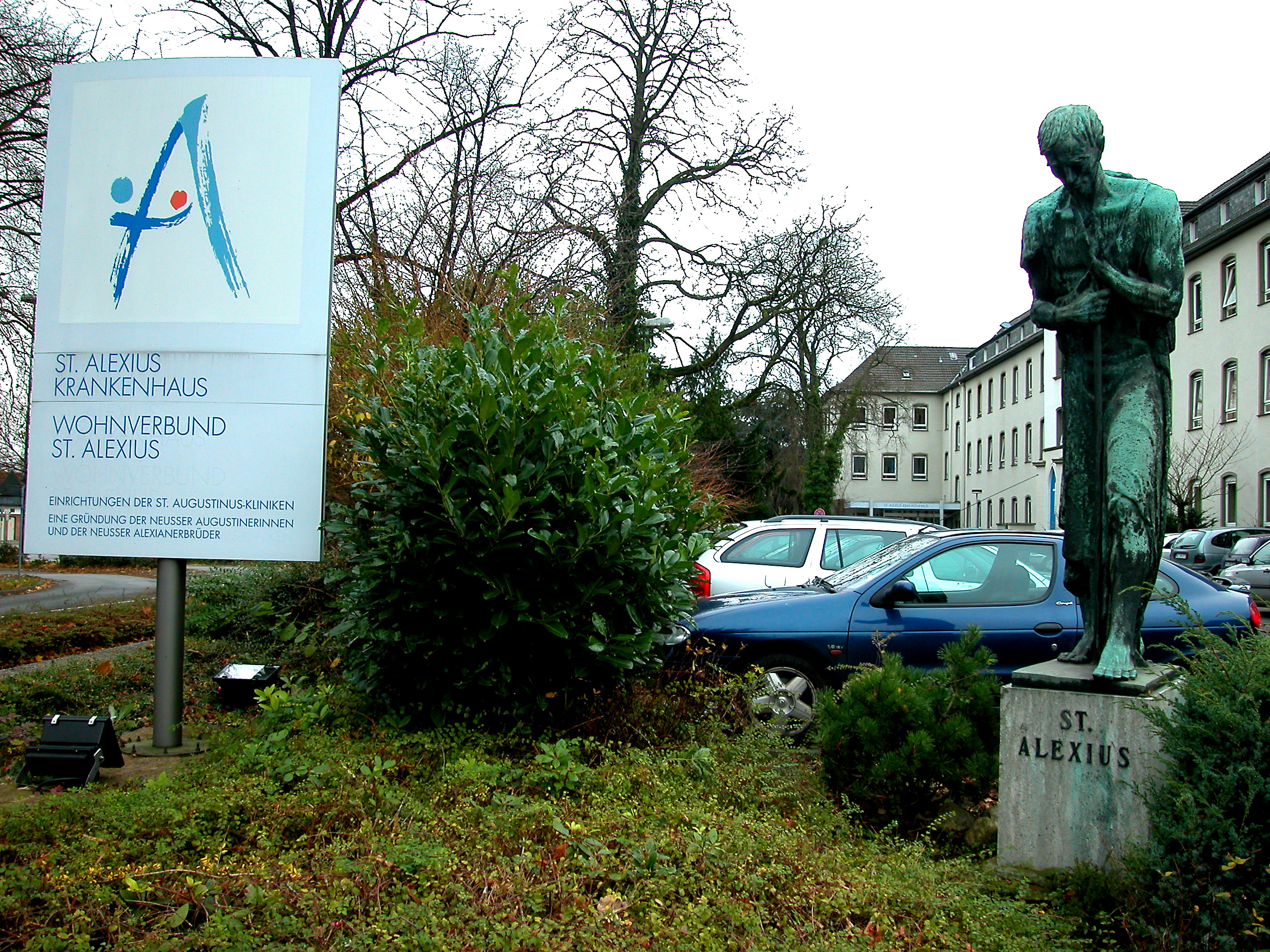 St. Alexius Krankenhaus. Neuss. Jakobsweg.